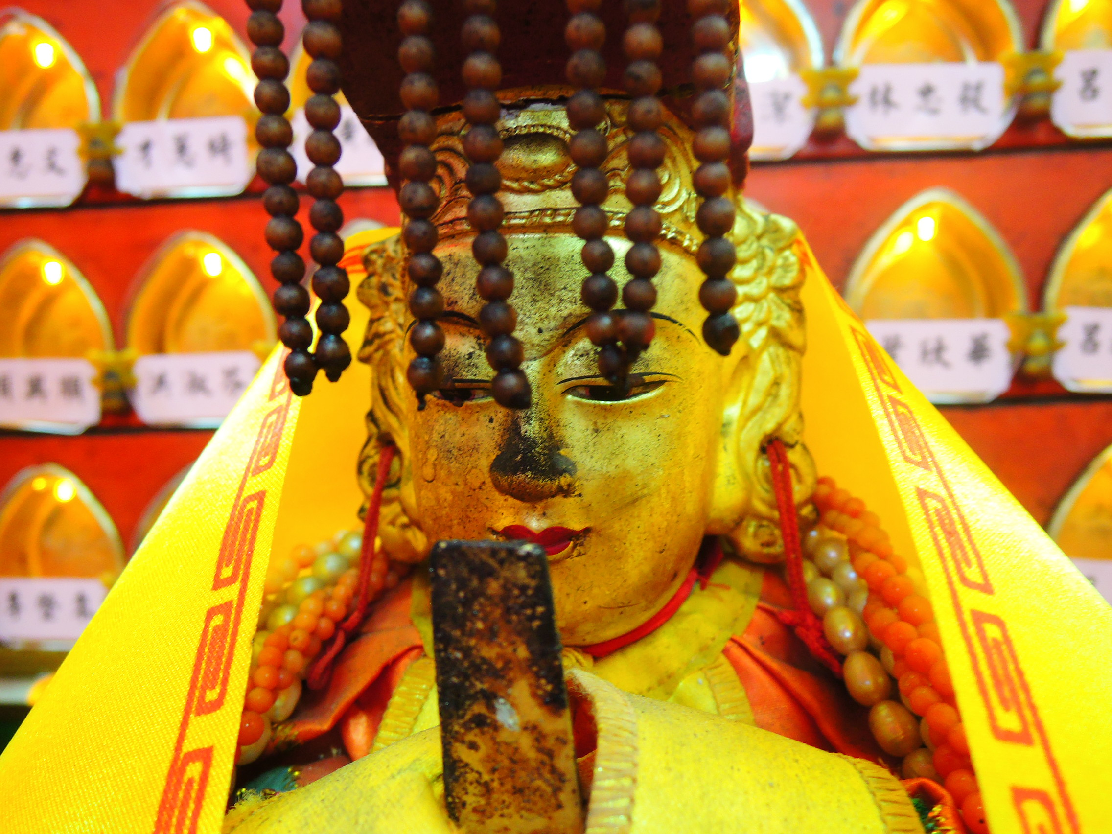 中文（台灣）: 境主靈應侯240周年遶境活動，移駕至媽宮城隍廟。